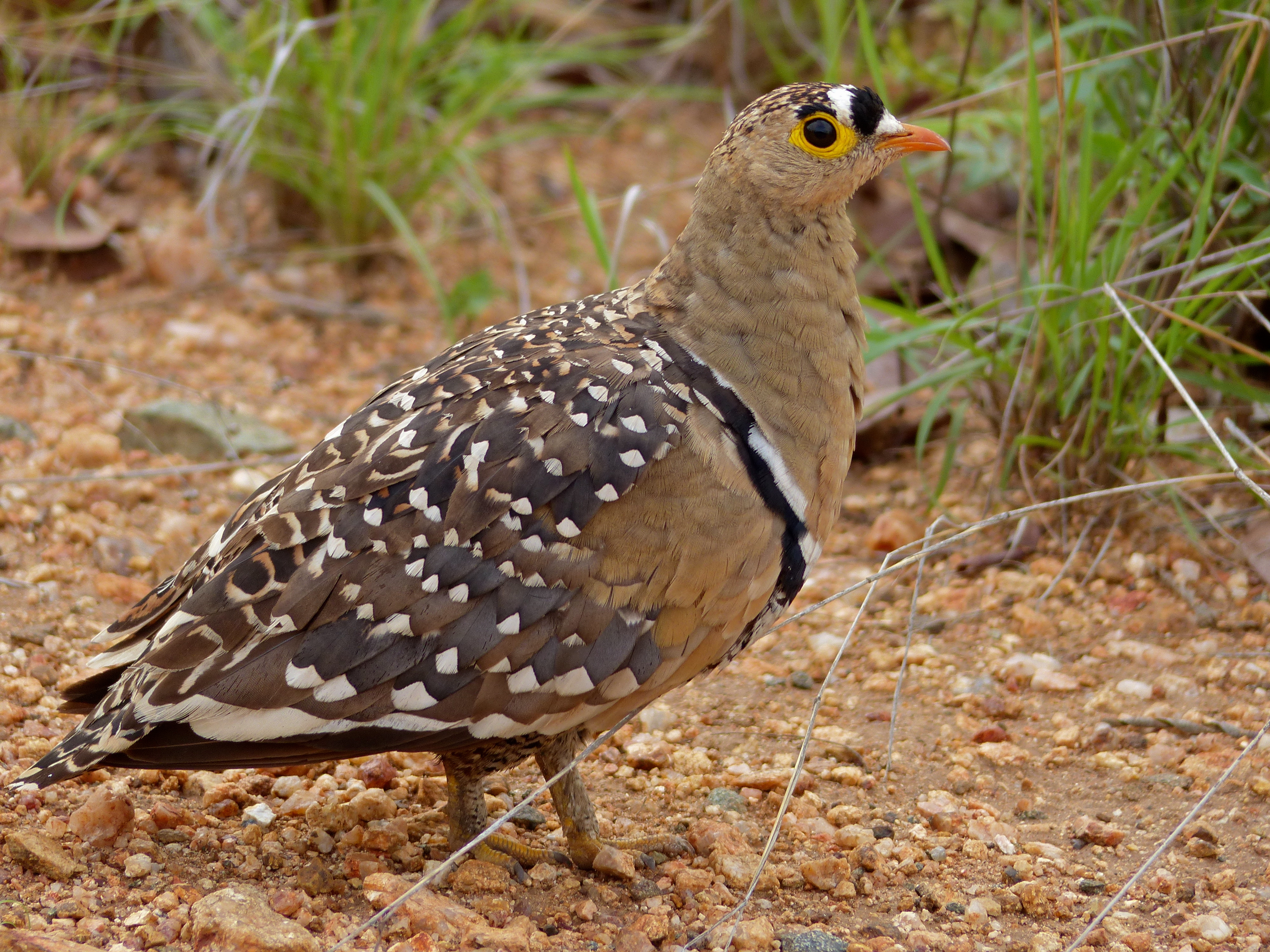 S146 Road West of Mopani, Kruger NP, SOUTH AFRICA